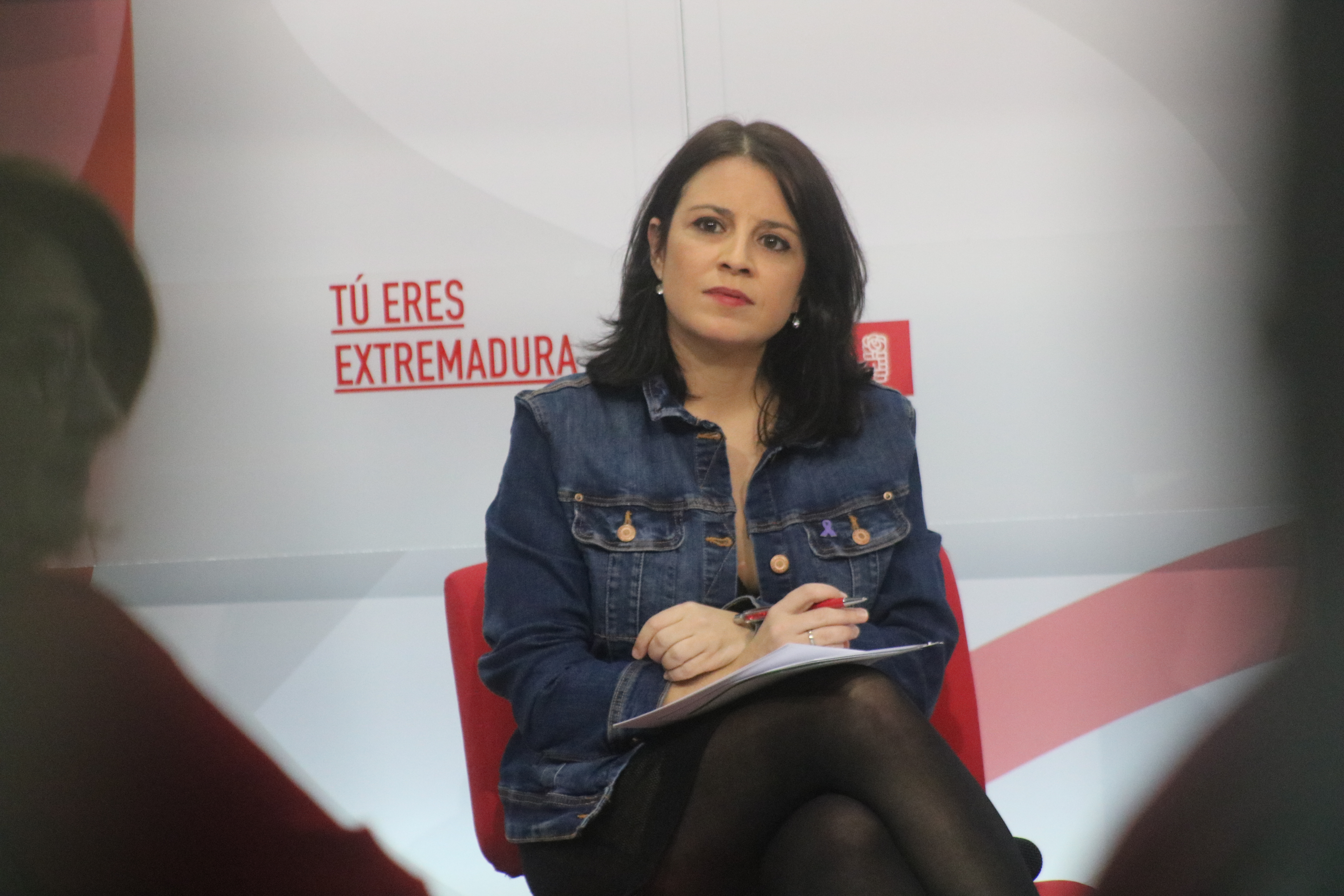 La "Asamblea Abierta sobre pensiones dignas" se hacelebrado en la sede del partido en Mérida. En el, intervienen la vicesecretaria general del PSOE, Adriana Lastra, el secretario general del PSOE de Extremadura y presidente de la Junta, Guillermo Fernández Vara, y el secretario general del PSOE de Mérida y alcalde de la localidad, Antonio Rodríguez Osuna